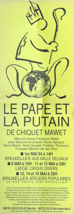 L'affiche annonçant les représentations du Pape et la putain en 1994 (Alternative Libertaire).